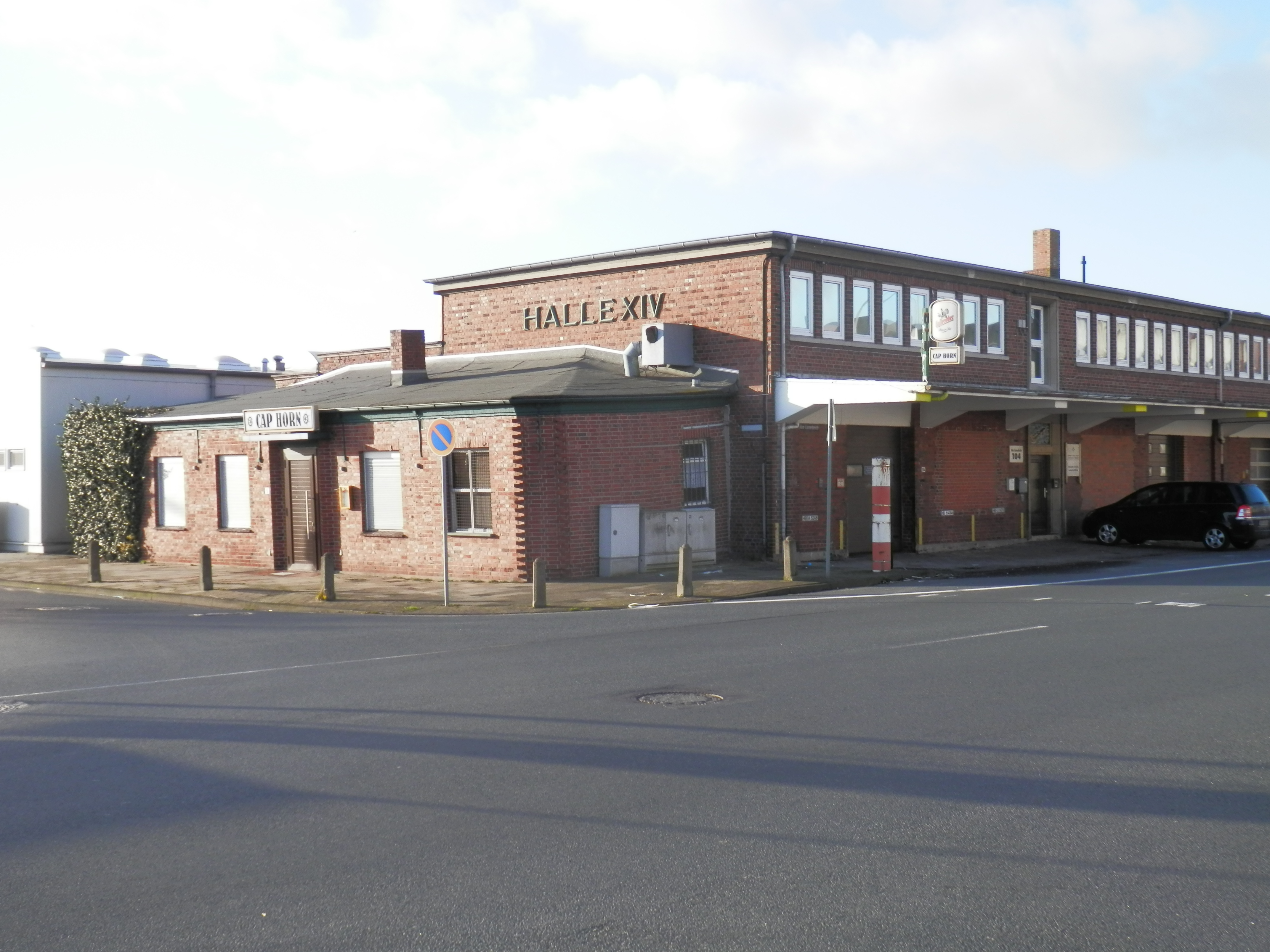 Packhalle XIV in Bremerhaven, Am Lunedeich Das abgebildete Objekt ist ein geschütztes Kulturdenkmal in der Freien Hansestadt Bremen, mit der Nr. 3006 beim Landesamt für Denkmalpflege registriert.